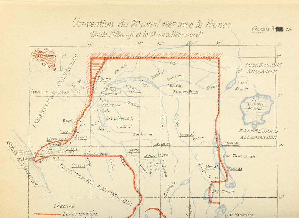 Convention du 29 avril 1887 avec la France, limite de l'Ubangi et du 4'è parallèle nord